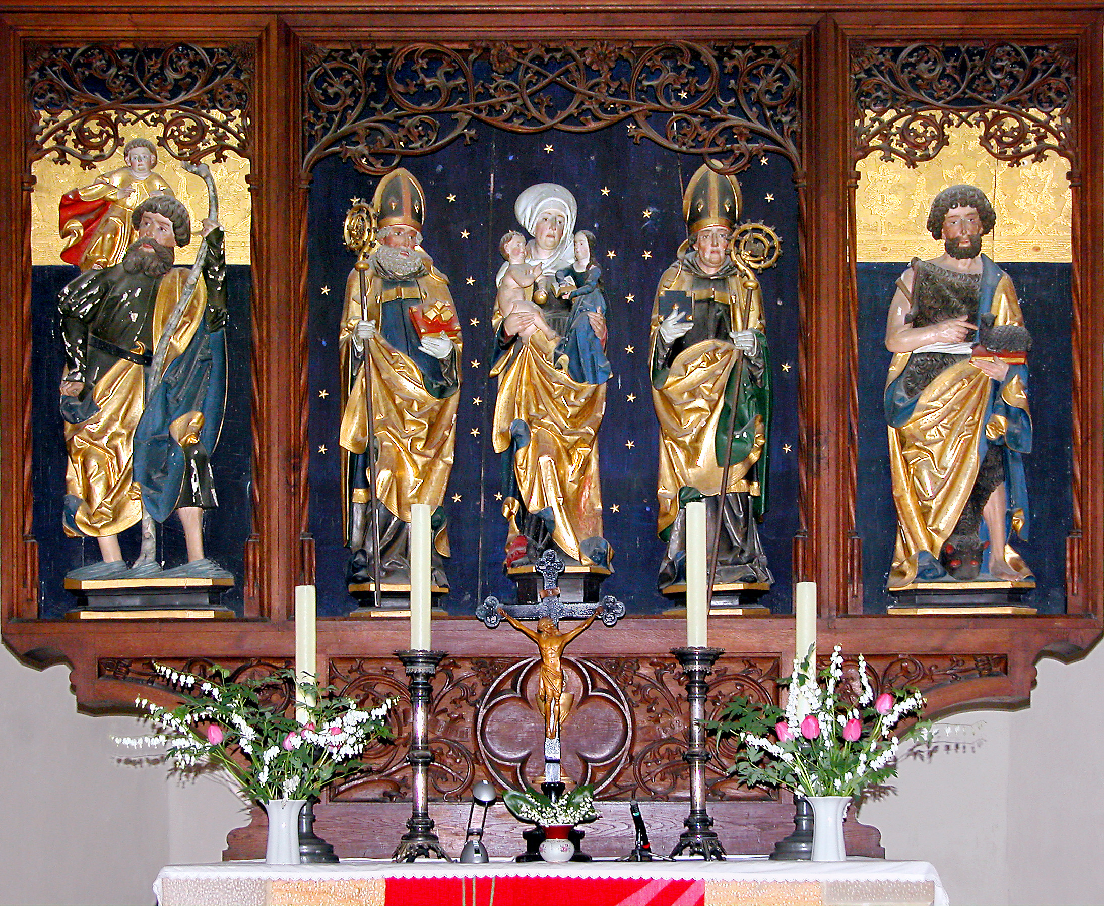 03.05.2009 04774 Dahlen (Sachsen): Stadtkirche Unserer Lieben Frauen. Altar mit spätgotischen Schnitzfiguren um 1520 vom Meister des Döbelner Hochaltars, im Altarschrein von 1863 aufgestellt. [DSCN37112.TIF]20090503185DR.JPG(c)Blobelt